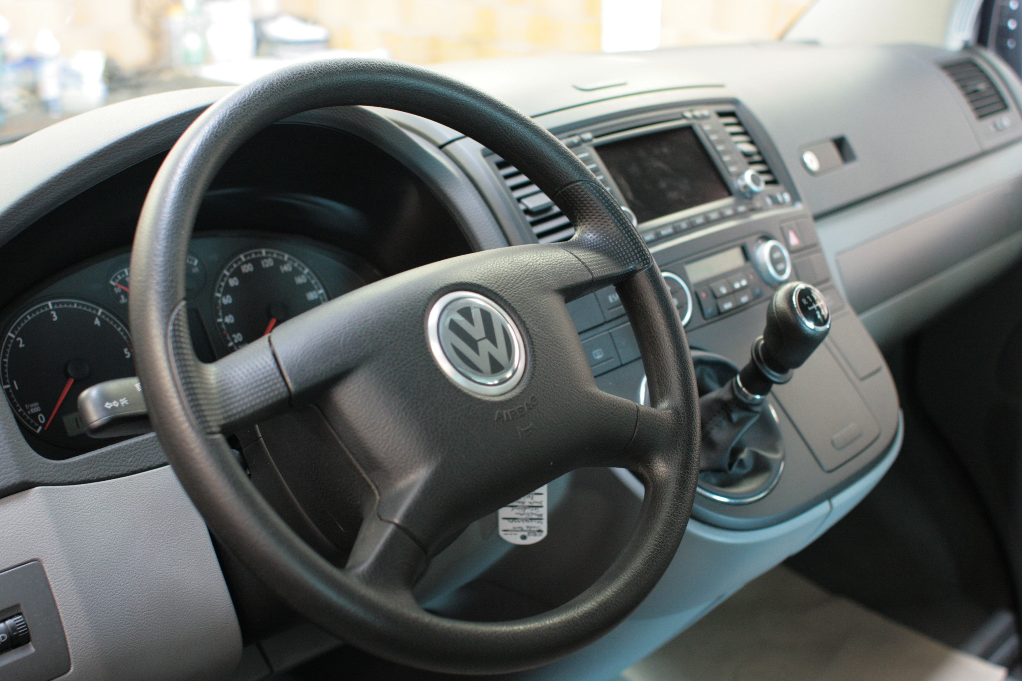 Multivan Innenraum